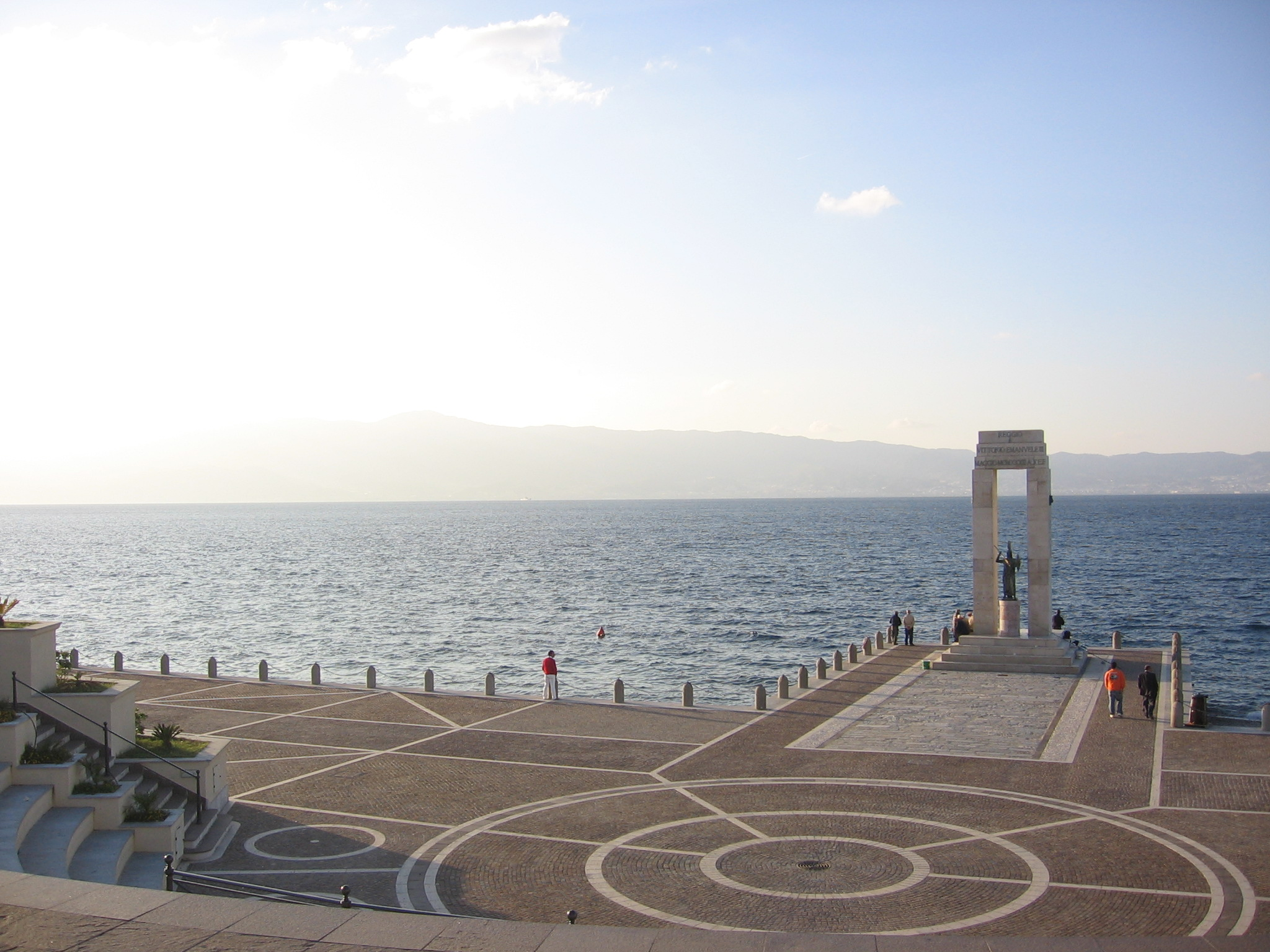 Reggio Di Calabria- Arena Dello Stretto